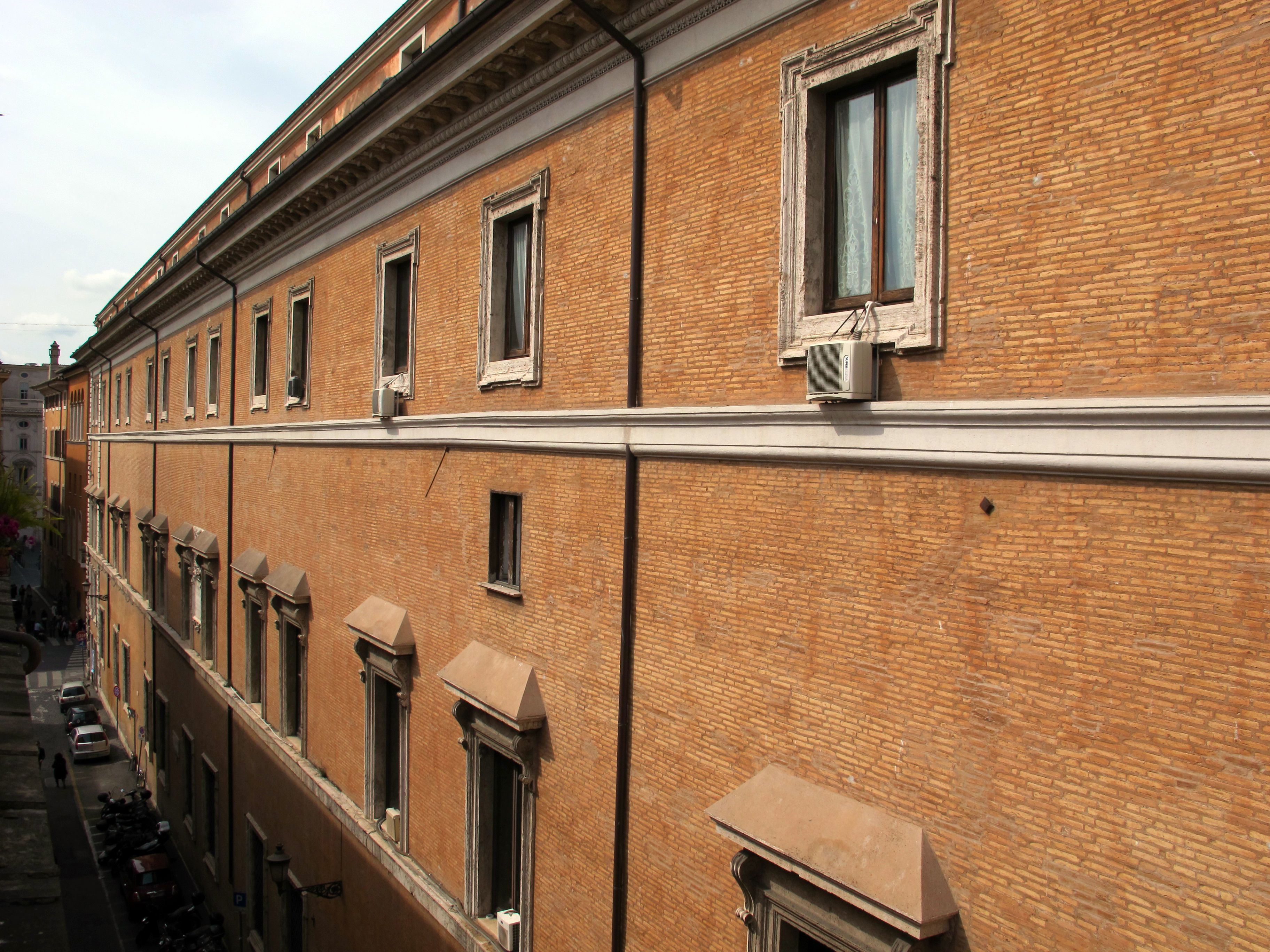 La sapienza, finestrato